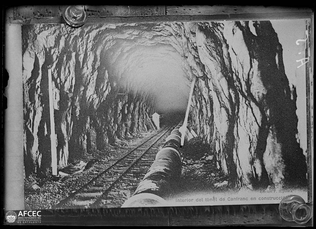 Imatge